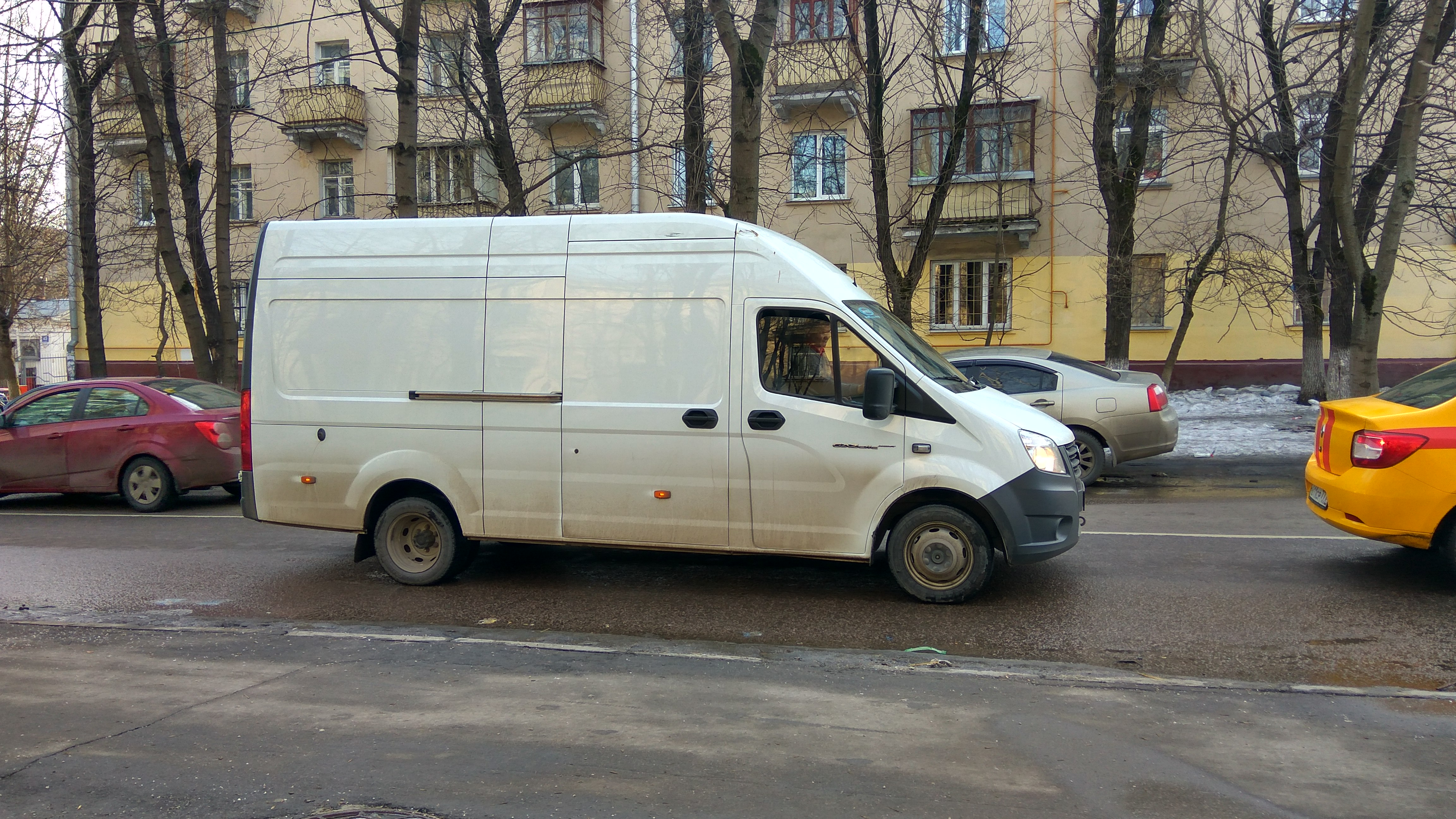 Frist time seen GaZELLE-Next Van